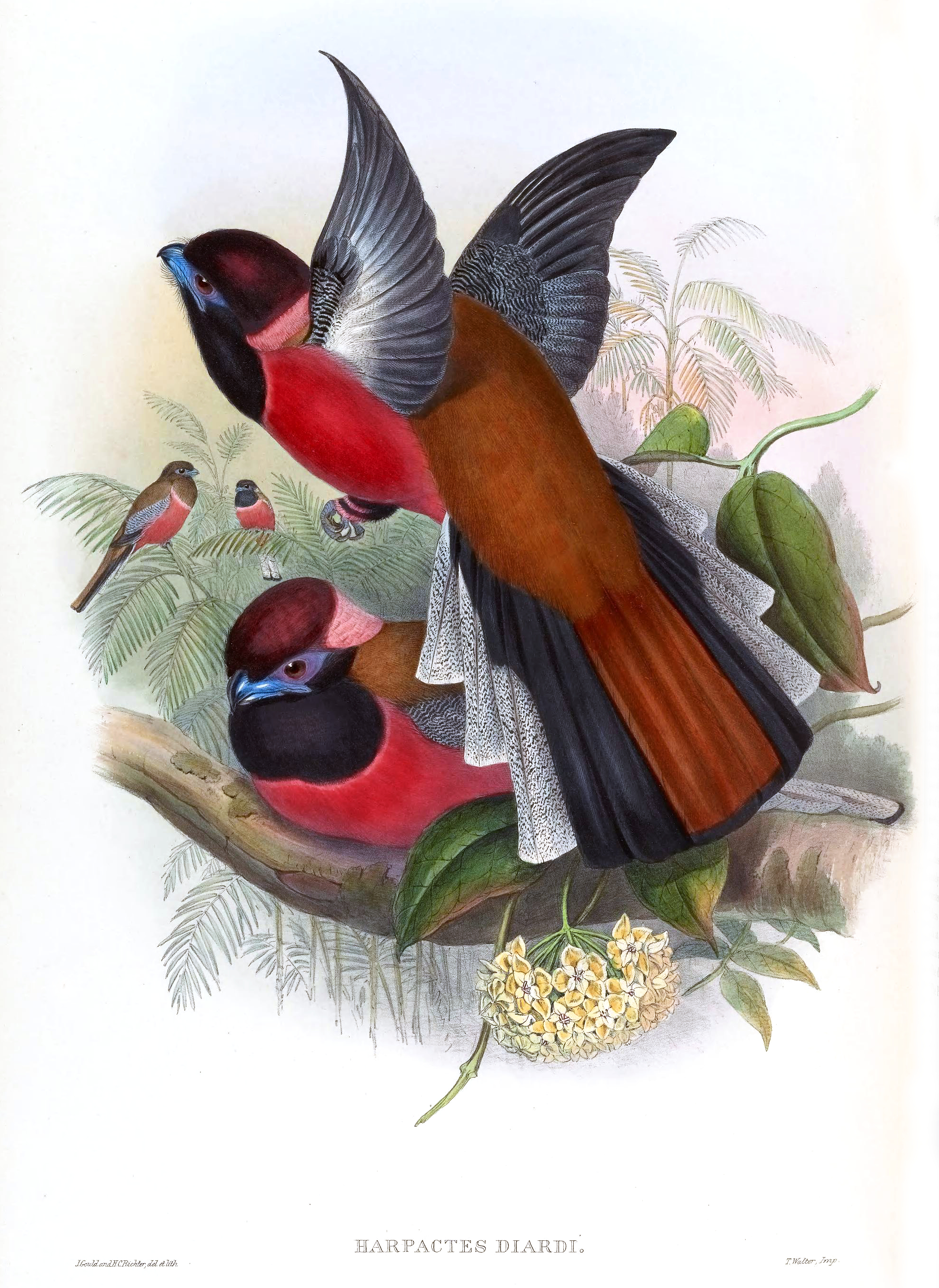 Harpactes diardi